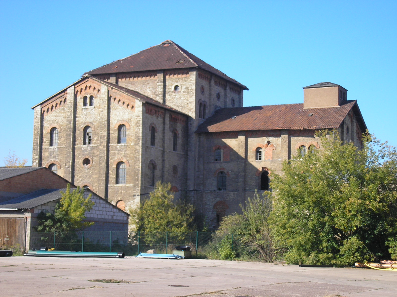 Eine alte Saline in Erfurt.